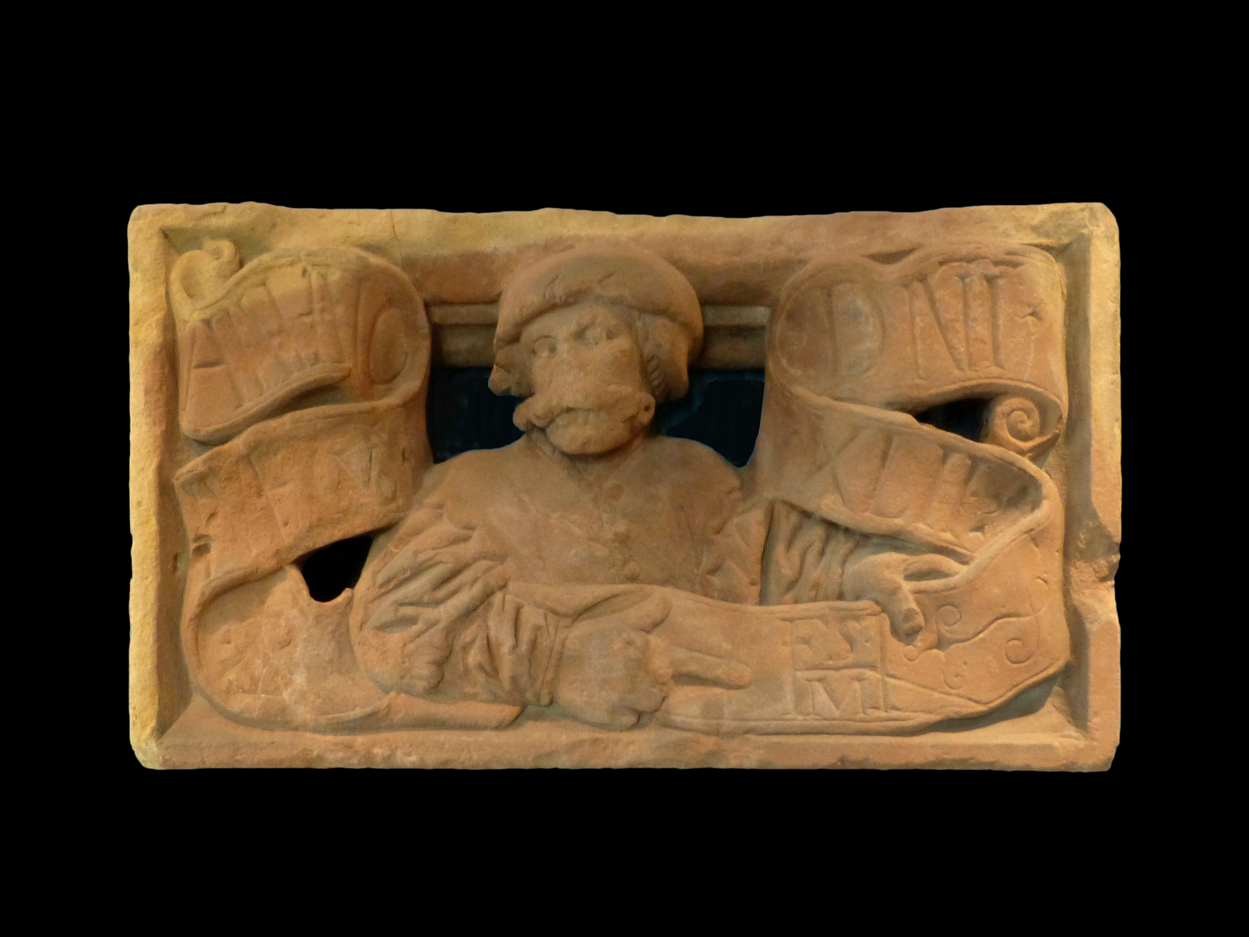 Friederich Hammer (cité à Haguenau de 1522 à 1545), : buste de 1542, grès rose mêlé de jaune. Musée historique de Haguenau.